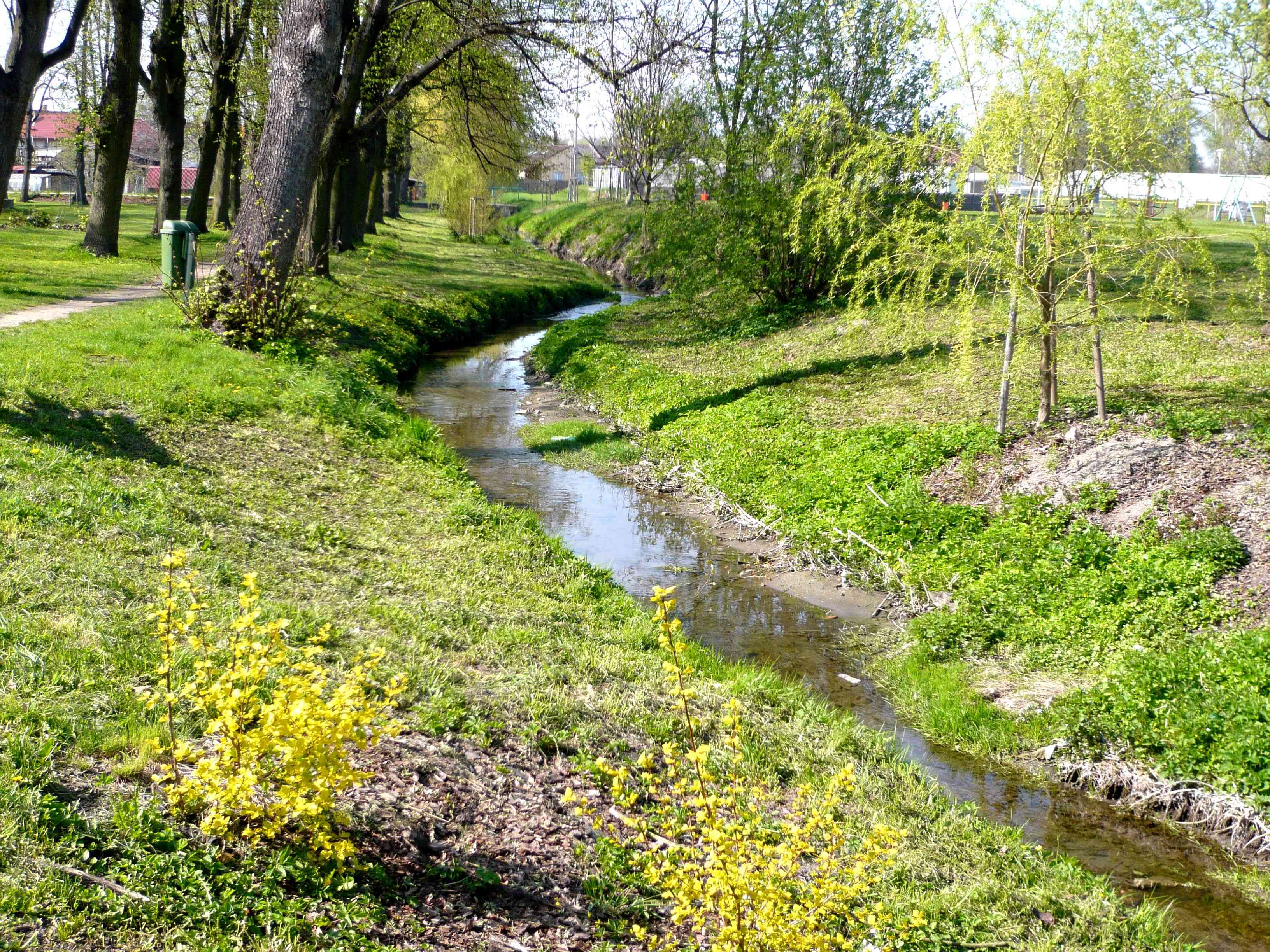 Švarcava